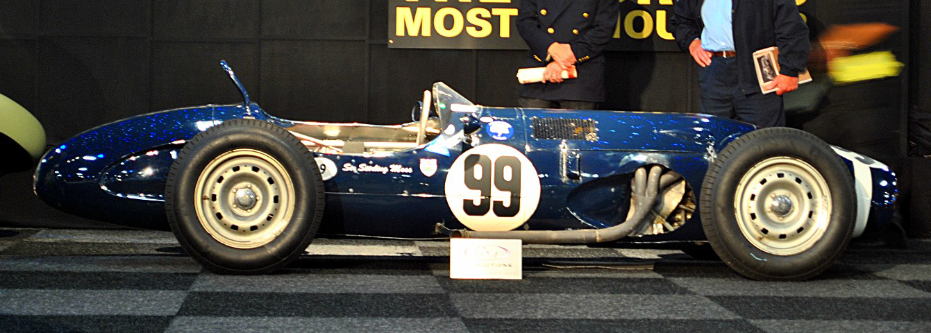 Ferguson-Climax P99 4 wheel drive Rob Walker Racing 1961